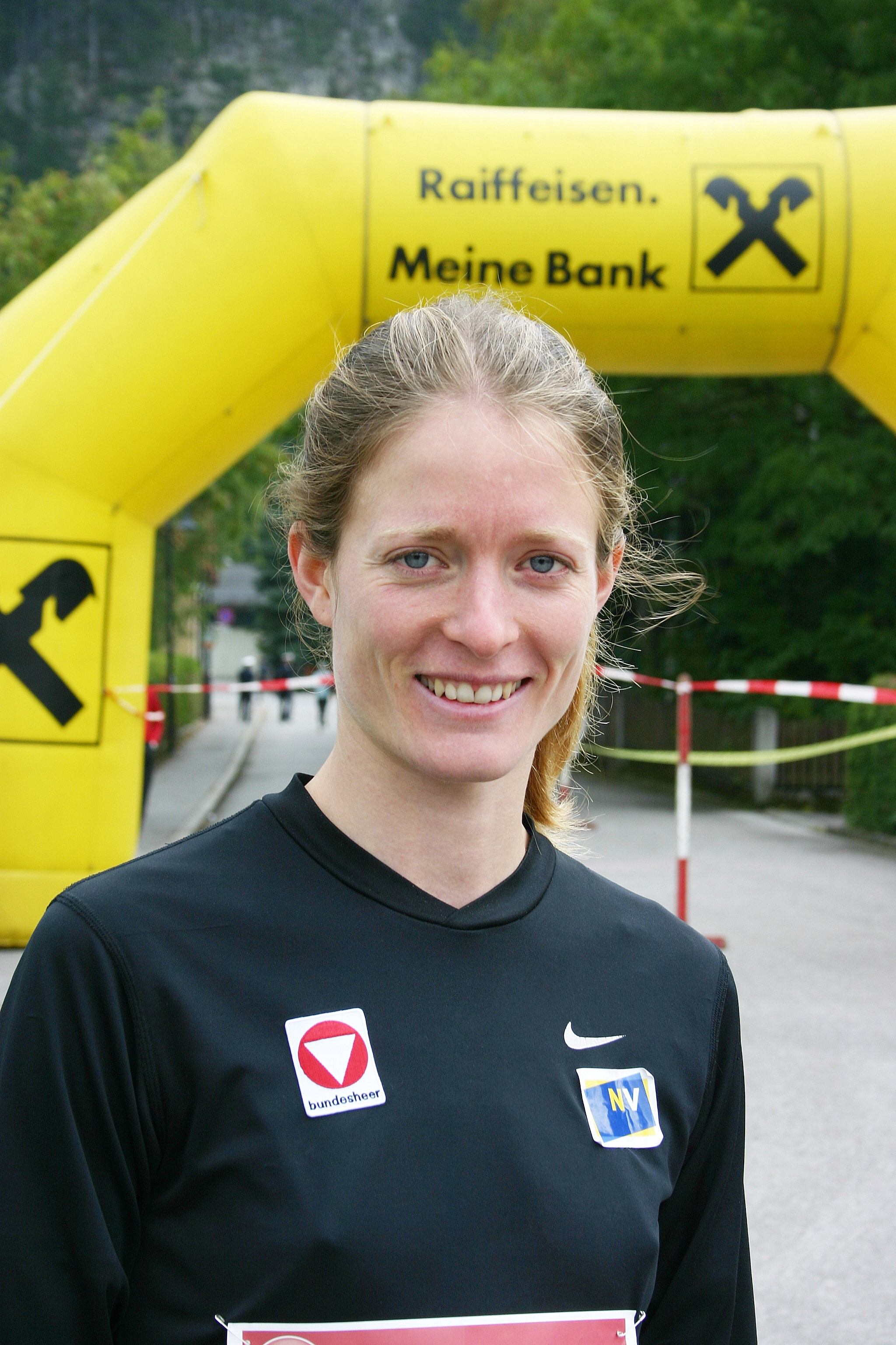 Andrea Mayr – Siegerin beim Schneeberglauf 2008 von Puchberg am Schneeberg auf den Hochschneeberg in neuer Rekordzeit